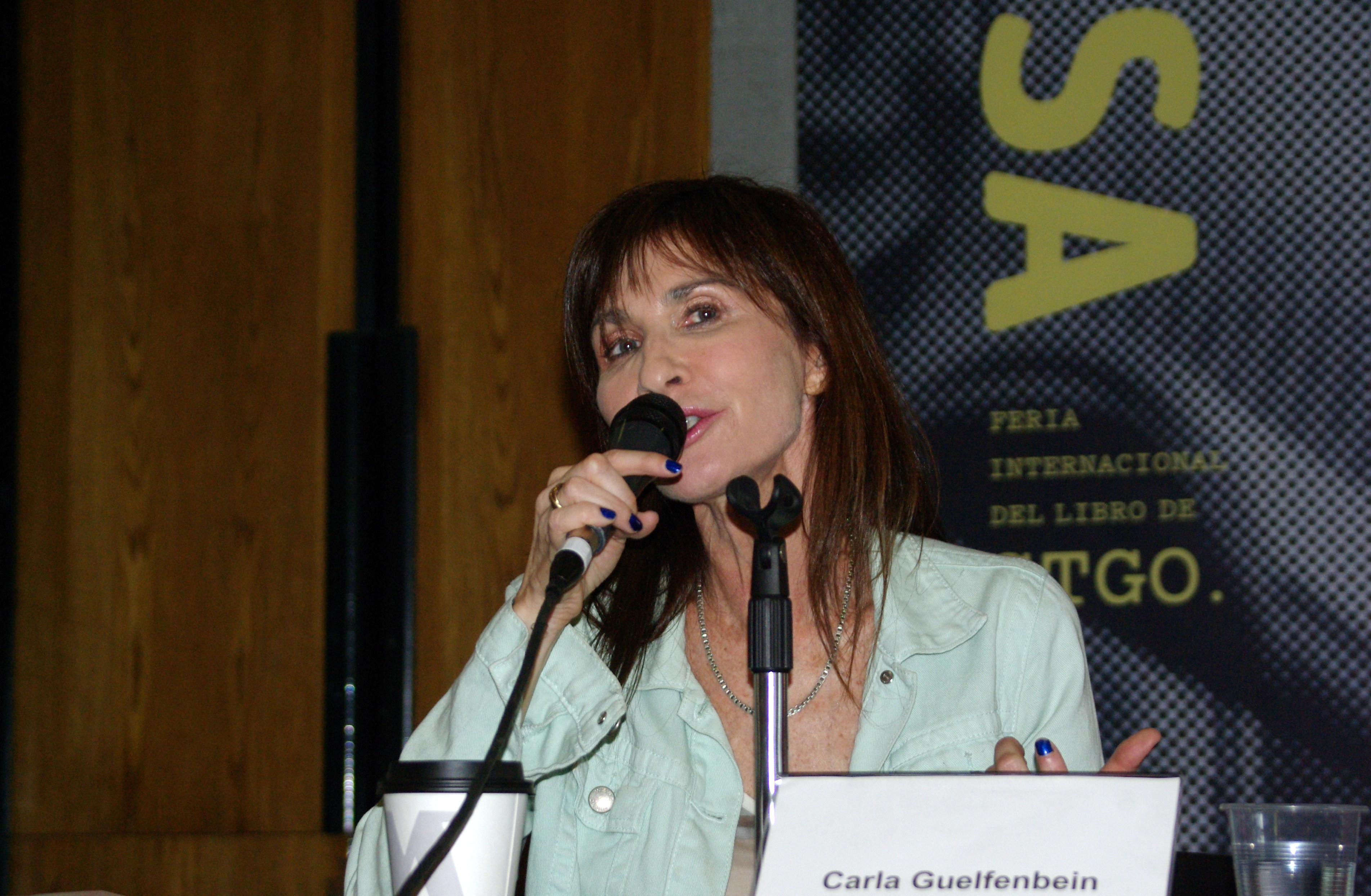 La escritora chilena Carla Guelfenbein en la Feria Internacional del Libro de Santiago 2015